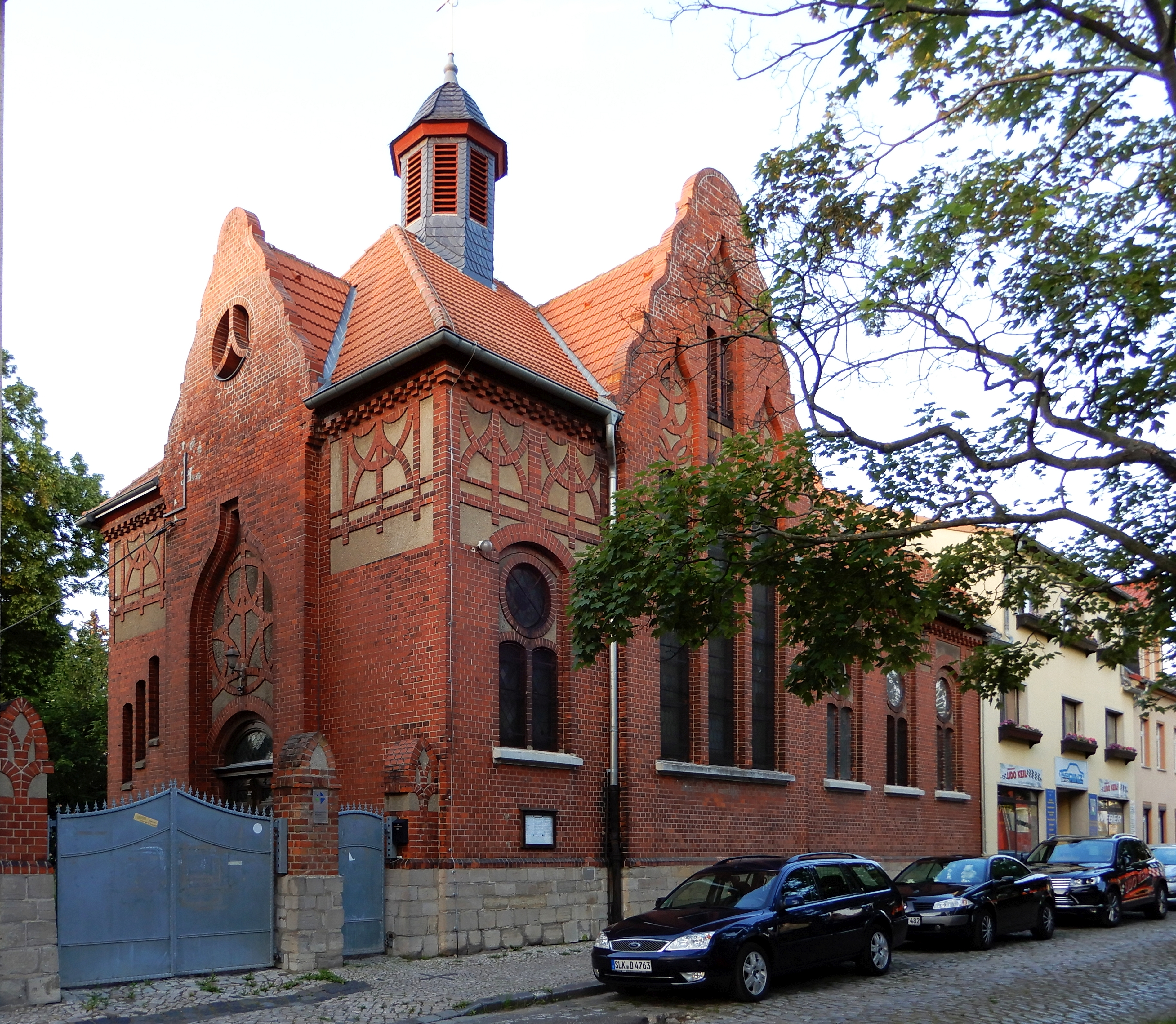 Johanniskirche am Marienplatz in der Oberstraße 36-38 in Aschersleben